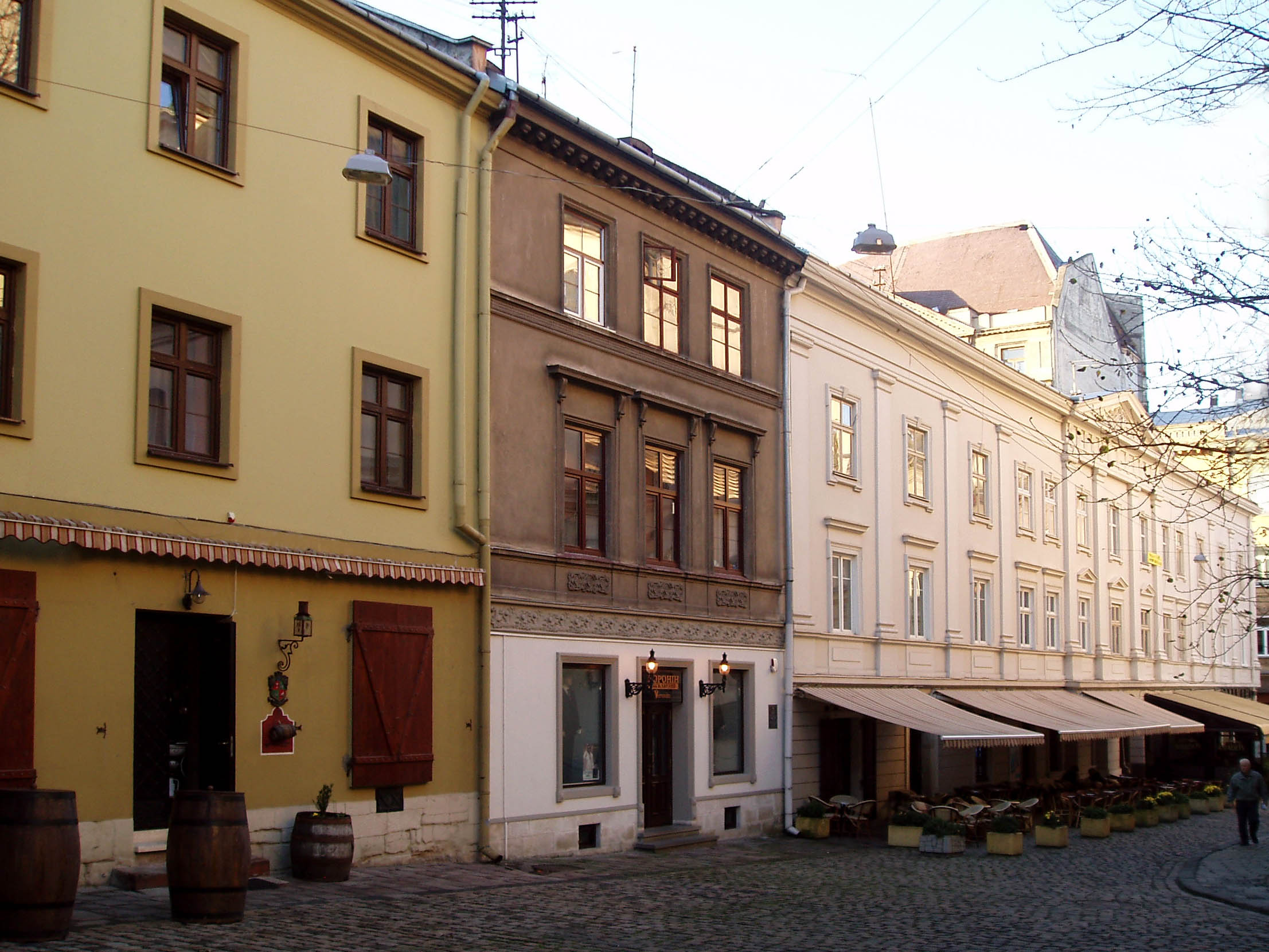 Забудова південної сторони площі Катедральної у Львові.